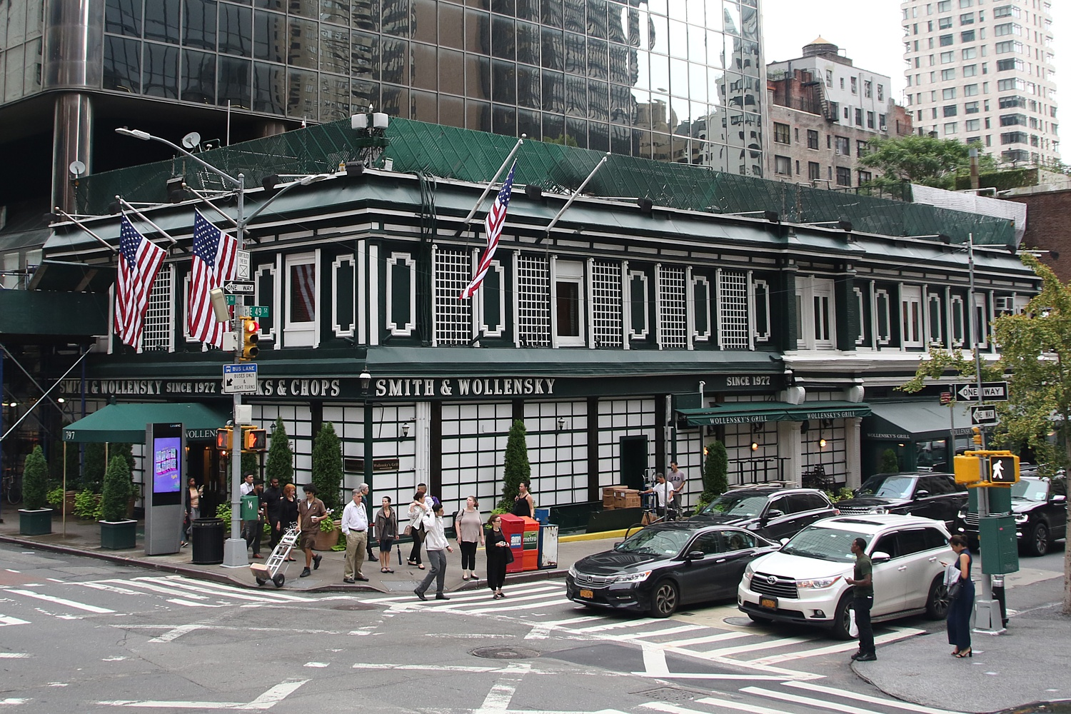 Stammhaus der Steakhauskette Smith & Wollensky in New York, 3 Ave Ecke E 49 St